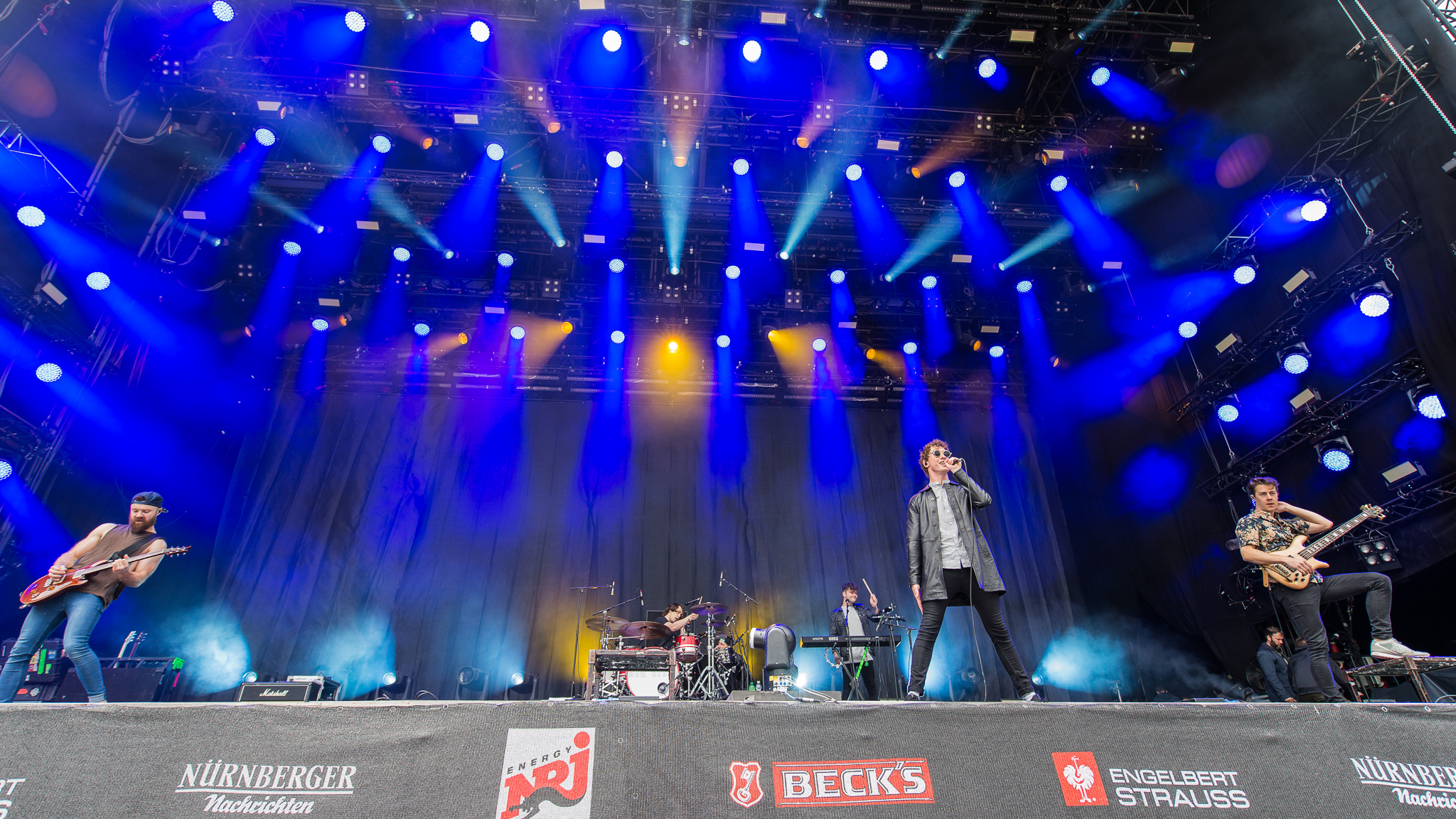 ARGO-Konzerte,Adam Marc,Beck's Park Stage,Don Broco,Konzert,Livekonzert,Livemusik,Matt Donnelly,Musik,RiP,Rob Damiani,Rock im Park 2017,Simon Delaney,Tom Doyle